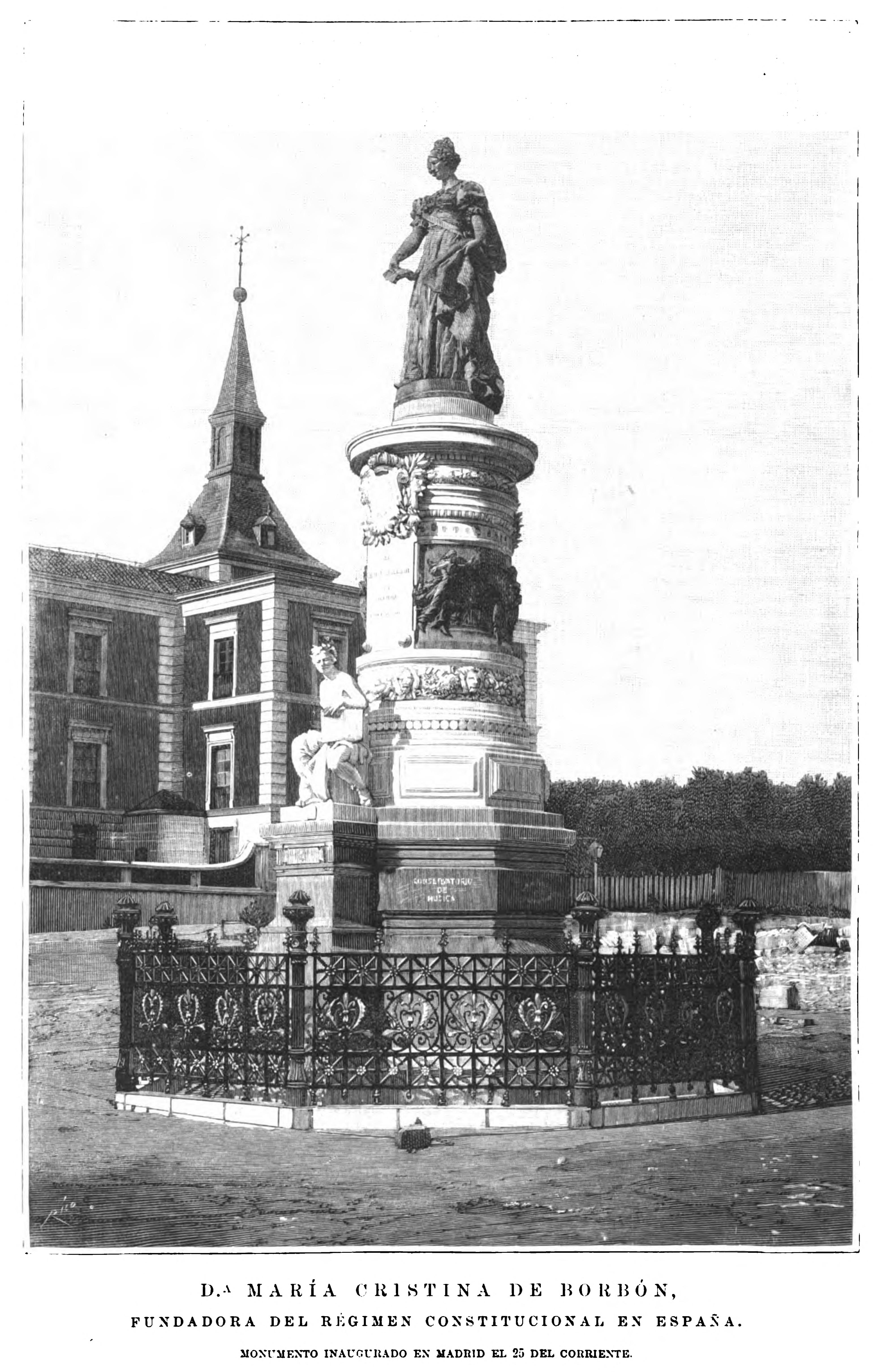 D.ª María Cristina de Borbón. Fundadora del régimen constitucional en España. Monumento inaugurado en Madrid el 25 del corriente.